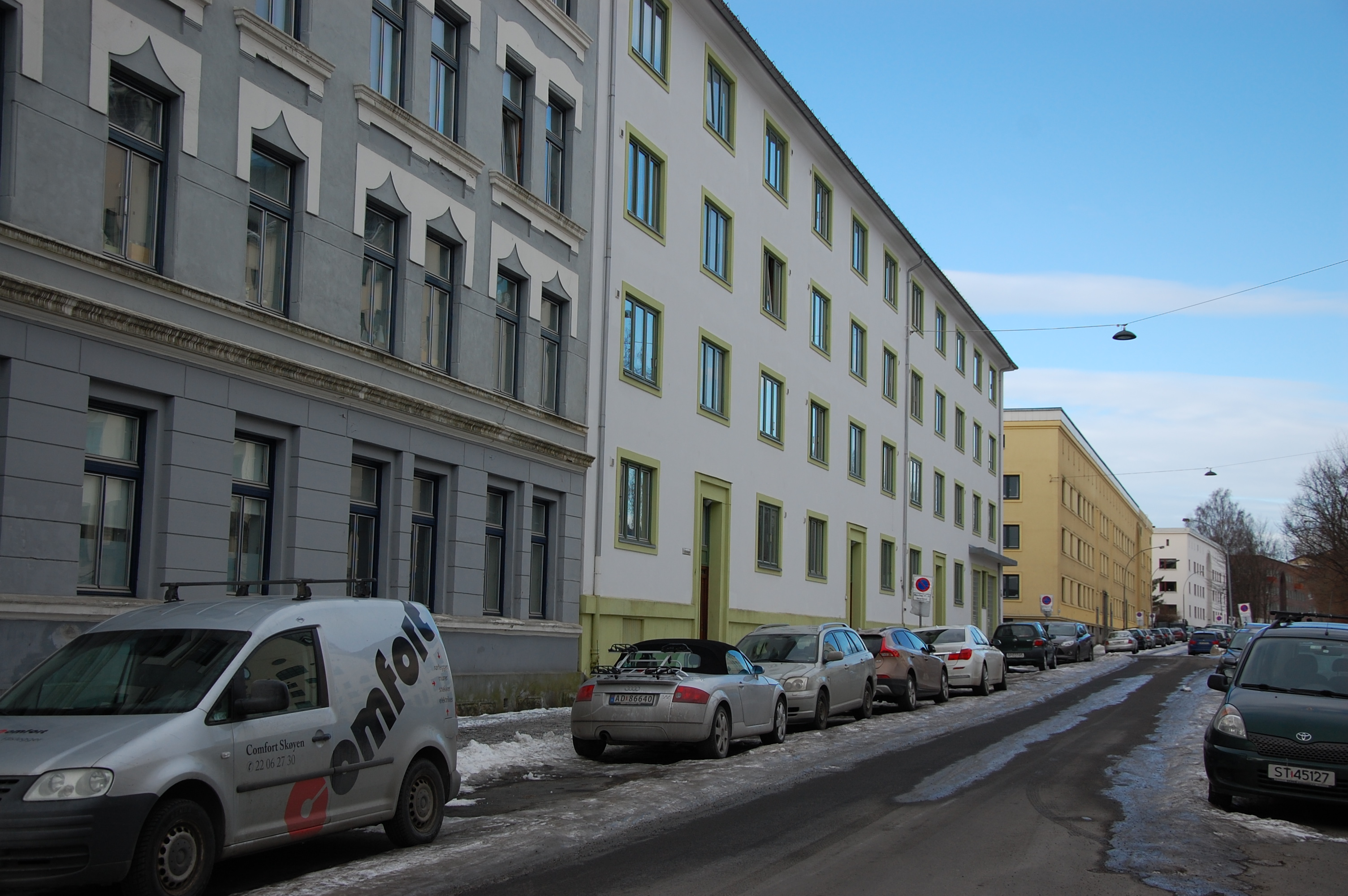 Kongsvingergata sett fra hjørnet ved Maridalsveien. Til venstre Maridalsveien 164, deretter Grimstadgata 23. Ned til venstre går Grimstadgata. Den gule hjørnegården er Kongsvingergata 30.